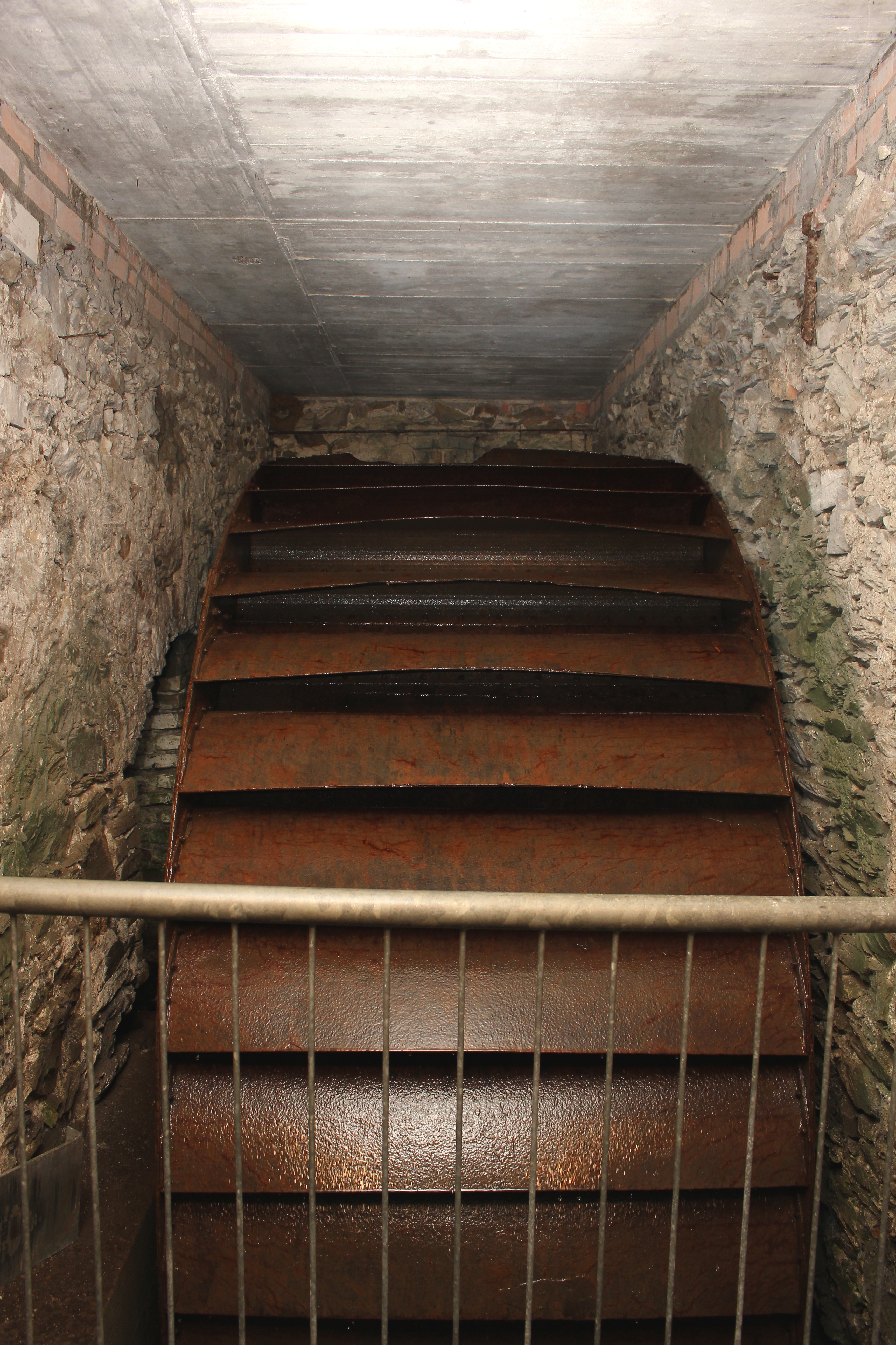 Hein’s Mühle in Sayn, Wasserrad